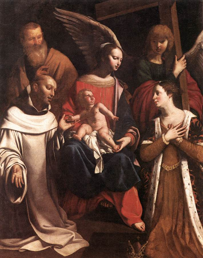 Caravagisme ; La Vierge portant l'Enfant Jésus trône au centre de la composition. Elle est honorée par saint Bruno (à gauche) et sainte Hélène, mère de Constantin (à droite), qui est reconnaissable à ses attributs de souveraine (couronne) ainsi qu'à la croix que porte un ange à sa suite (cf. invention de la croix du Christ). Derrière saint Bruno, saint Joseph représenté en vieillard.